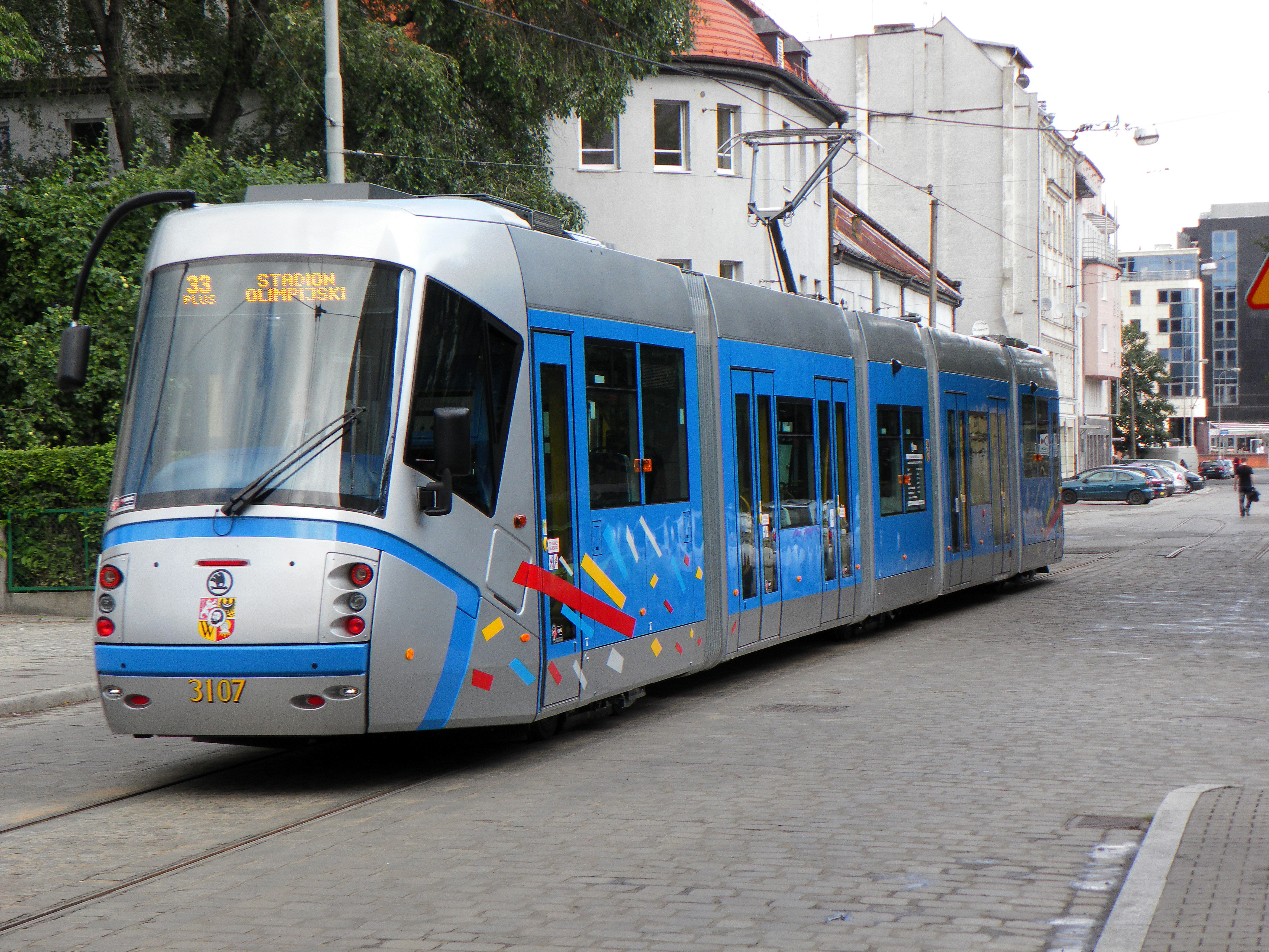 Škoda 19 T 3107 na ulicy Wierzbowej we Wrocławiu